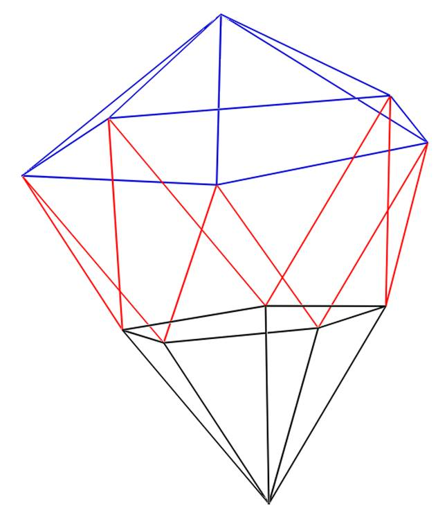 A csúcs csonka ikozaédere